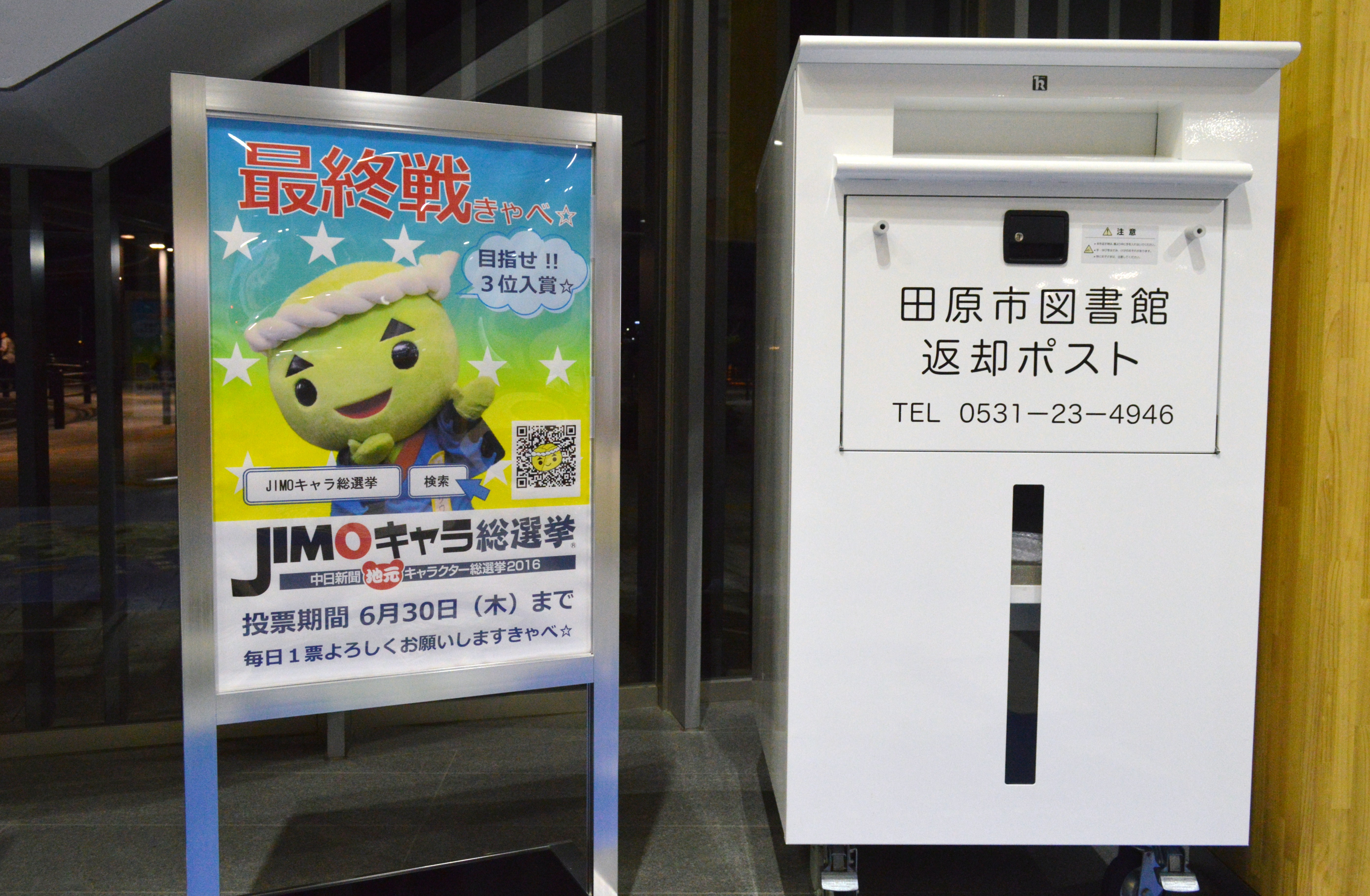 豊橋鉄道渥美線三河田原駅に設置してある図書の返却ポスト（田原市図書館）。